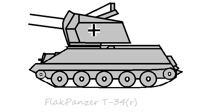 FlakPanzer T-34(r)